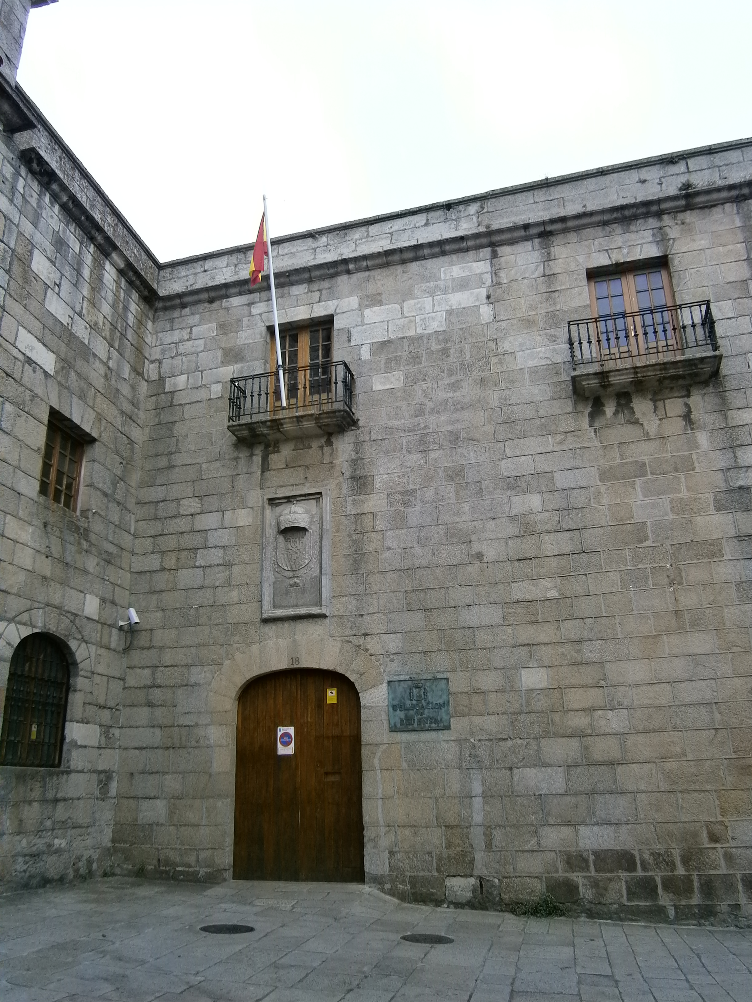 Cuartel de San Domingos (Cidade Vella da Coruña)